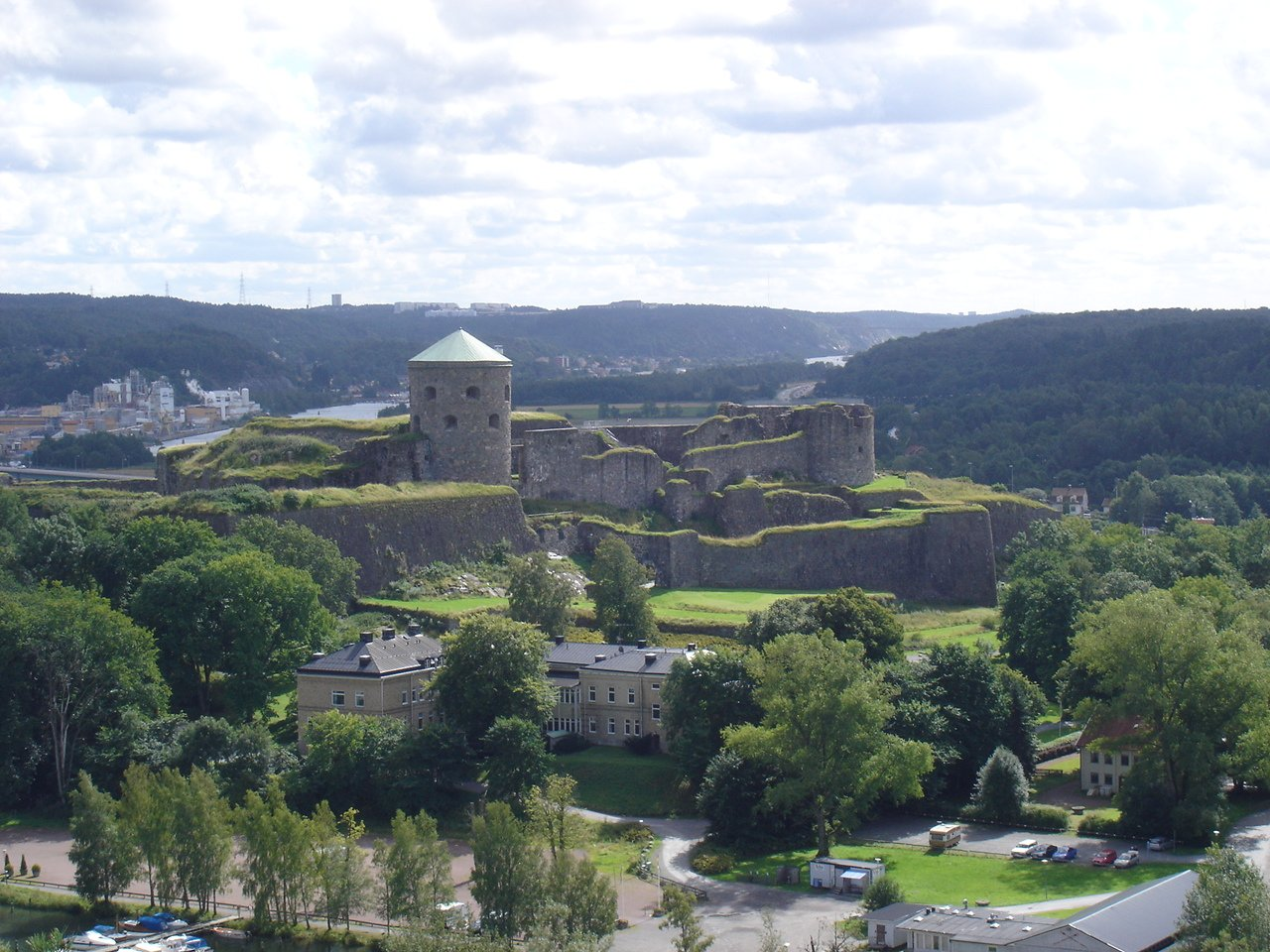 le fort de Bohus (Bohus fästning) à Kungälv en Suède, vu depuis les hauteurs du vieux Kungälv, au mois d'août 2005.